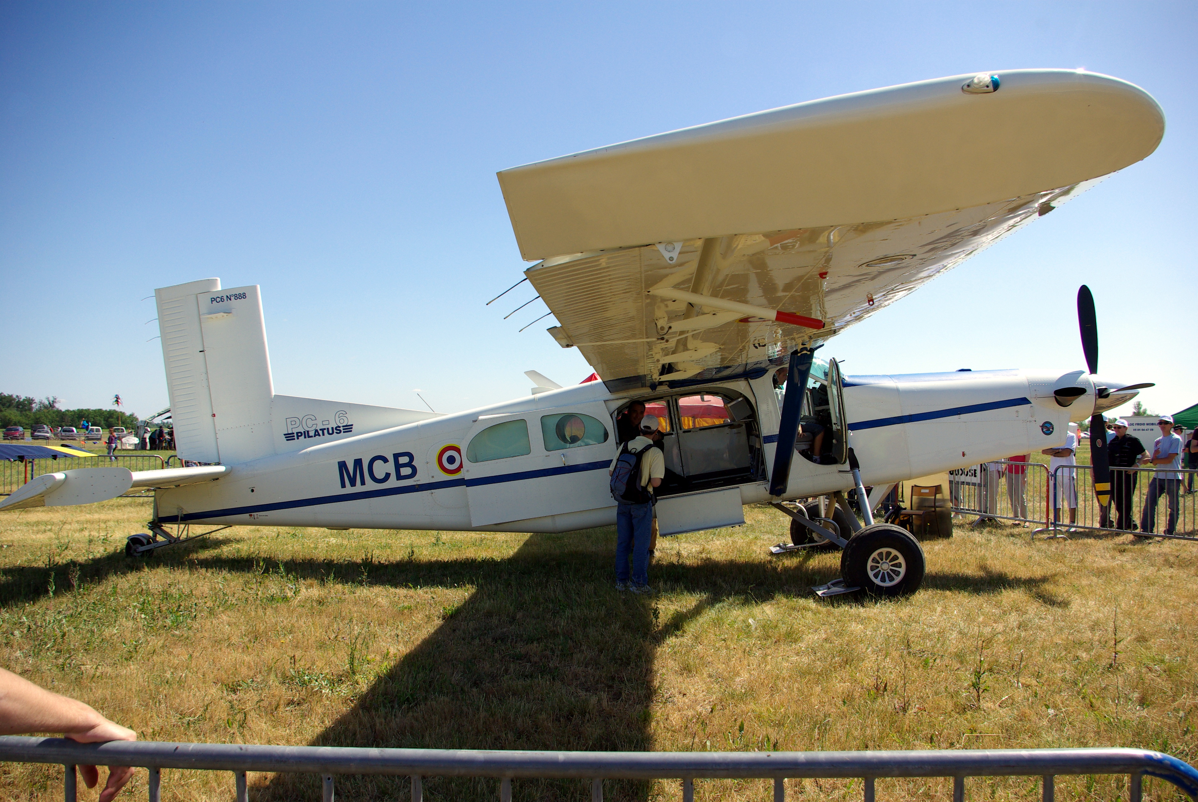 Pilatus PC-6 en présentation statique au meeting AirExpo 2011.